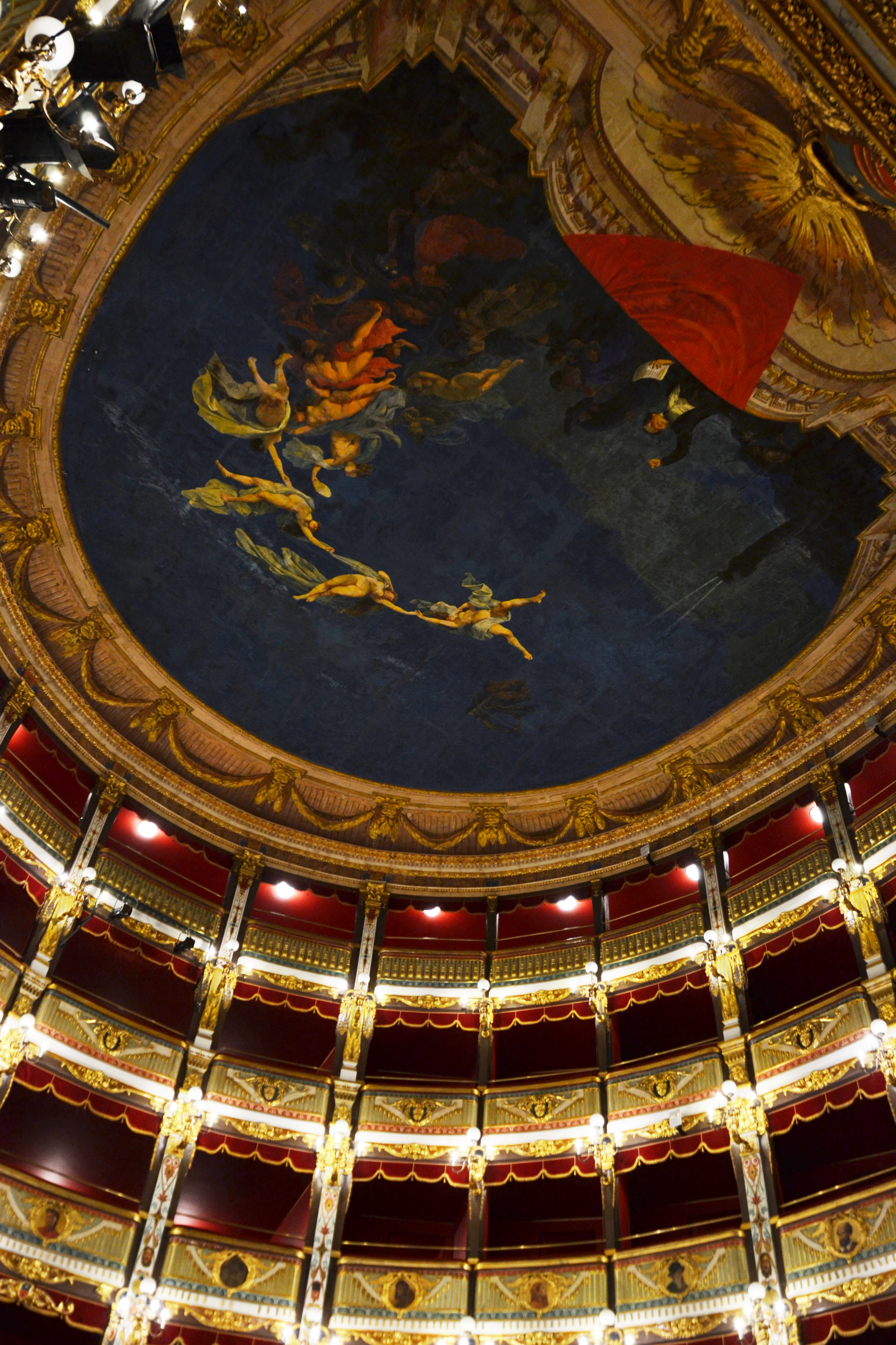 Interno del Teatro Verdi di Salerno